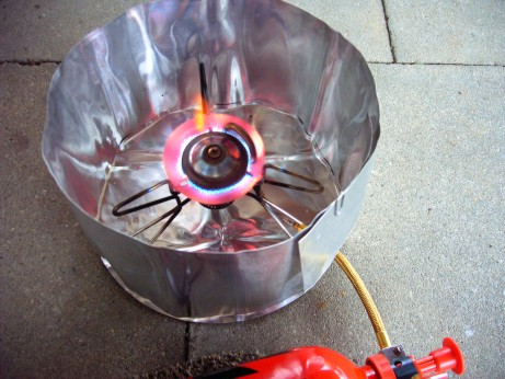 Ein Benzinkocher von MSR im Betrieb. Die rote Brennstoffflasche ist im Bild unten noch teilweise zu sehen, der Kocher steht auf einem Wärmereflektorschild und ist umgeben von einem Aluminium-Faltblechwindschutz.